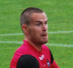 Fodboldspilleren Anders Qvist fra FC Roskilde. Her i 1. divisionskampen mod Viborg FF på Viborg Stadion.